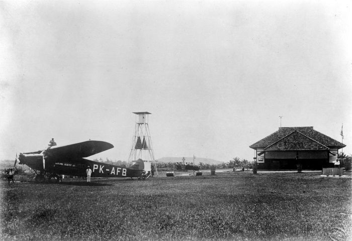 Repronegatief. Vliegveld Tjililitan met benzinestation bij Meester Cornelis, Batavia, Java